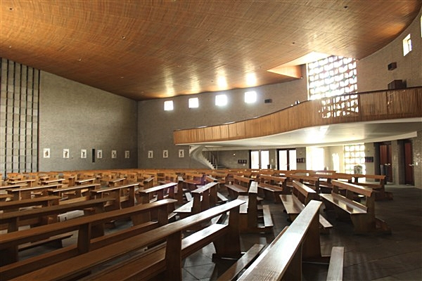 We kijken naar de ingang van de kerk, waarboven een lang oksaal. Licht valt binnen via de 'glas-in-beton'-constructie en de ramen, hoog in de muren. Er is een overvloed aan natuurlijk warmkleurig hout: het plafond en de essenhouten banken. Links zien we de 'glas-in-beton'-constructie van Maurits Nevens. Aan de muur bemerken we de verschillende staties van de Kruisweg, uitgevoerd door firma Art Grossé (Brugge).